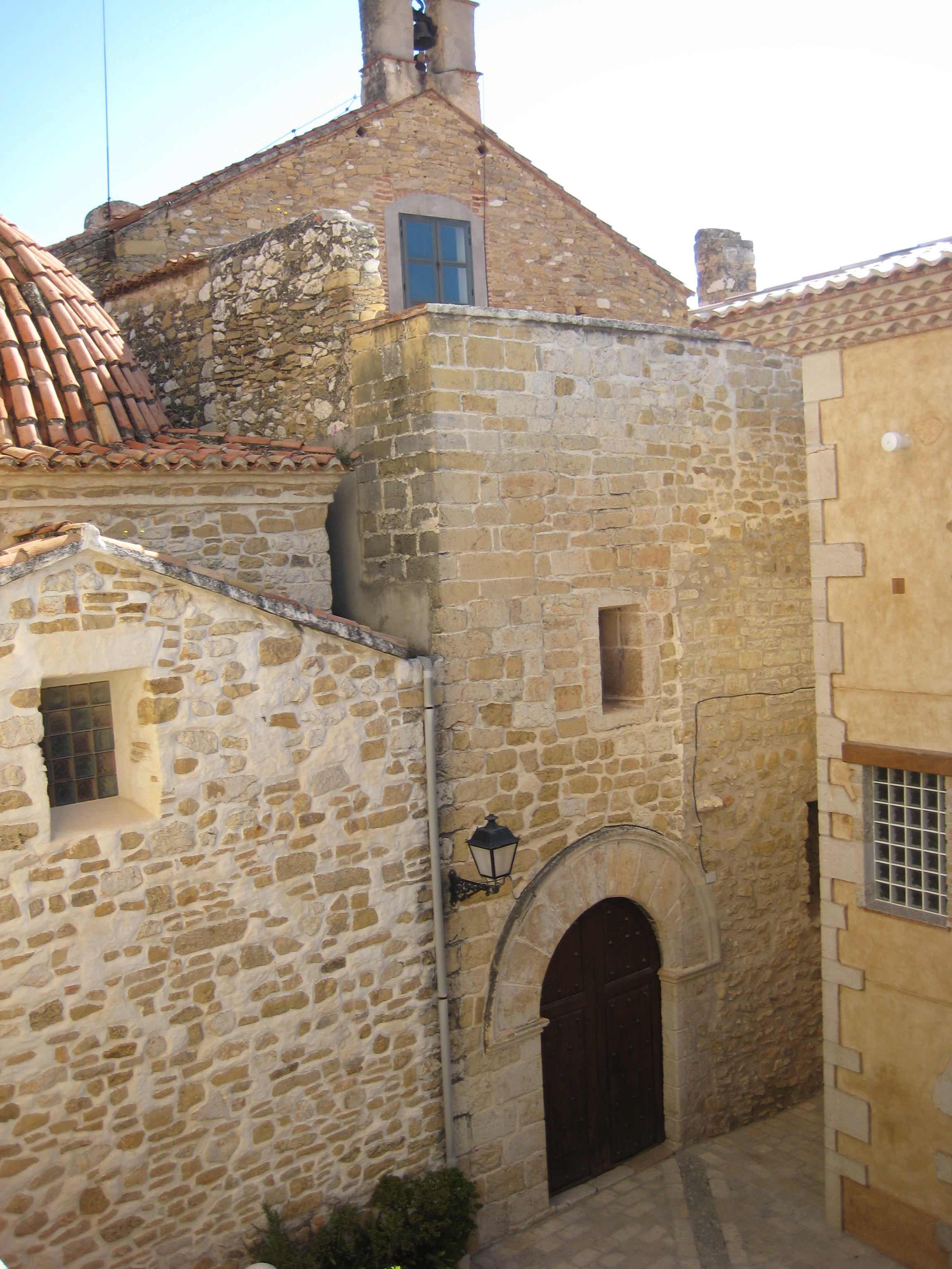 Església de l'Assumpció de Cervera del Maestrat (Baix Maestrat)